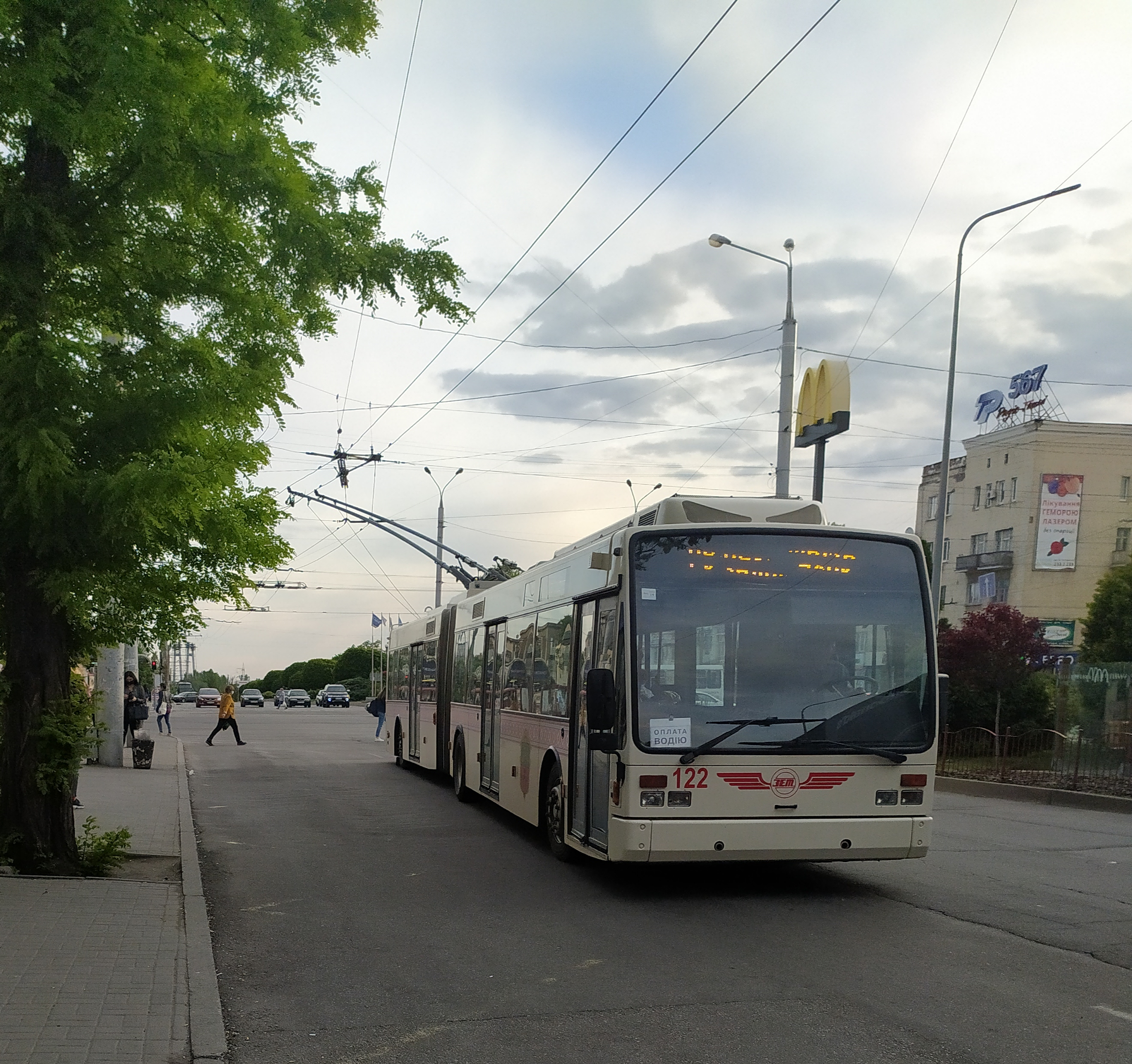 Запоріжжя. Проспект Металургів Тролейбус Van Hool AG 300T (№ 122)